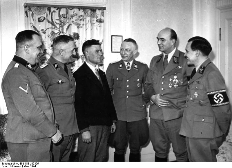 Lodz, Millionster Umsiedler im Wartheland Der millionste Deutsche im Wartheland. Im Zuge der gegenwärtig durchgeführten Umsiedlung der Schwarzmeerdeutschen im Reichsgau Wartheland ist die Zahl der Deutschen in diesem Gau auf eine Million gestiegen. Reichsstatthalter Gauleiter Greiser (zweiter von rechts) empfing den millionsten Ansiedler im Warthegau, einen Schwarzmeerdeutschen, aus dem Dorf Hoffenthal bei Taganrog, und unterhielt sich längere Zeit mit ihm. Links vom Gauleiter Ritterkreuzträger SS-Brigadeführer Reinefahrt, rechts Gaupropagandaleiter Maul. Scherl Bilderdienst (Hoffmann) 16.3.44 / AVZ 10662 Abgebildete Personen: Greiser, Arthur: Senatspräsident von Danzig, Gauleiter Warthegau, Deutschland Reinefarth, Heinz Dr.: SS-Obergruppenführer, Ritterkreuz (RK), Waffen-SS, Polizeigeneral, MdL, Bundesrepublik Deutschland (GND 128604689) Information added by Wikimedia users.*Wilhelm Maul, Gaupropagandaleiter Posen